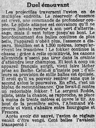 Le Matin du 22 juin 1916 - Paul Rodde